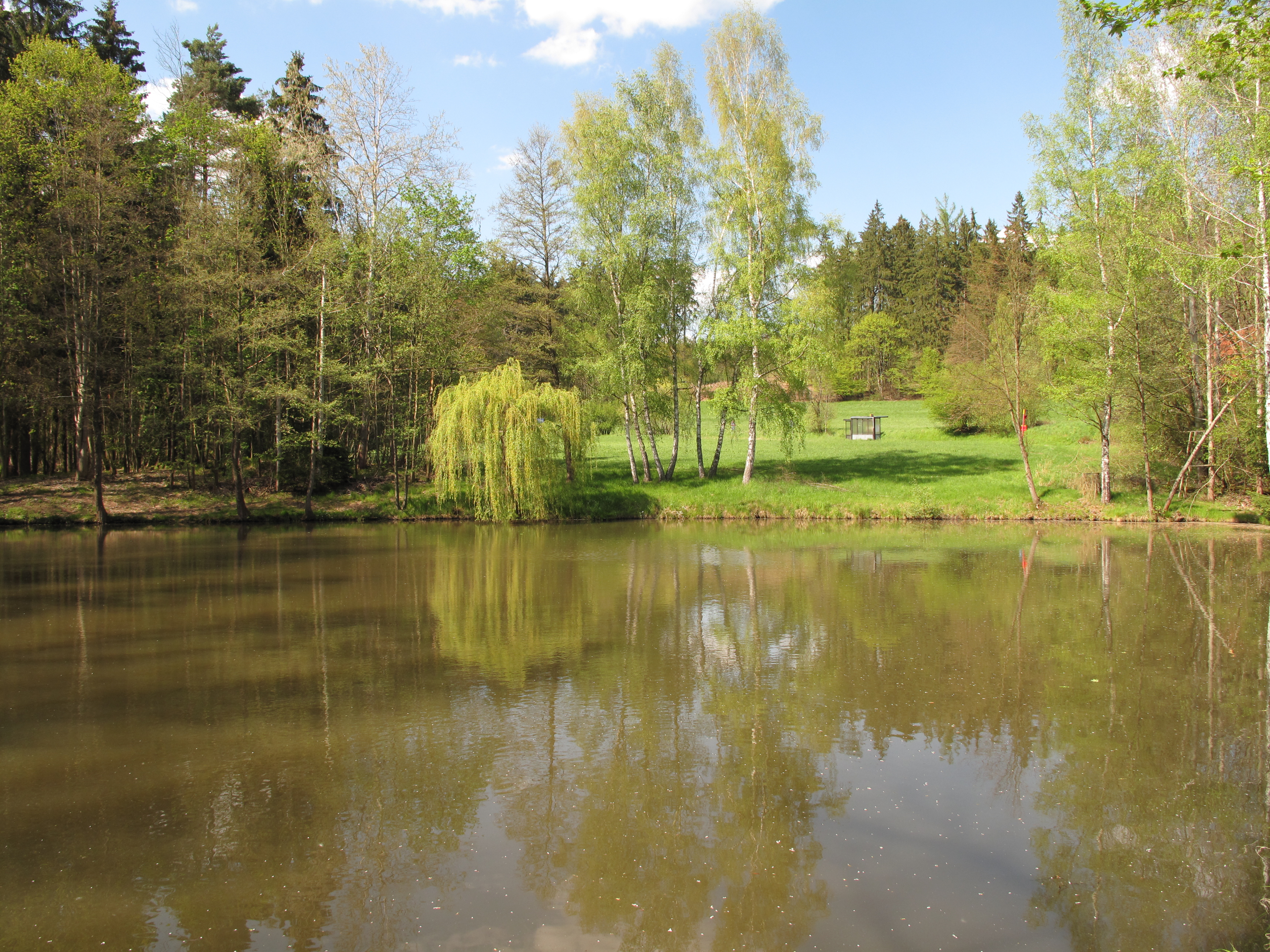 Rybník Sádky na Jevanském potoce. Okres Praha-východ, Česká republika.